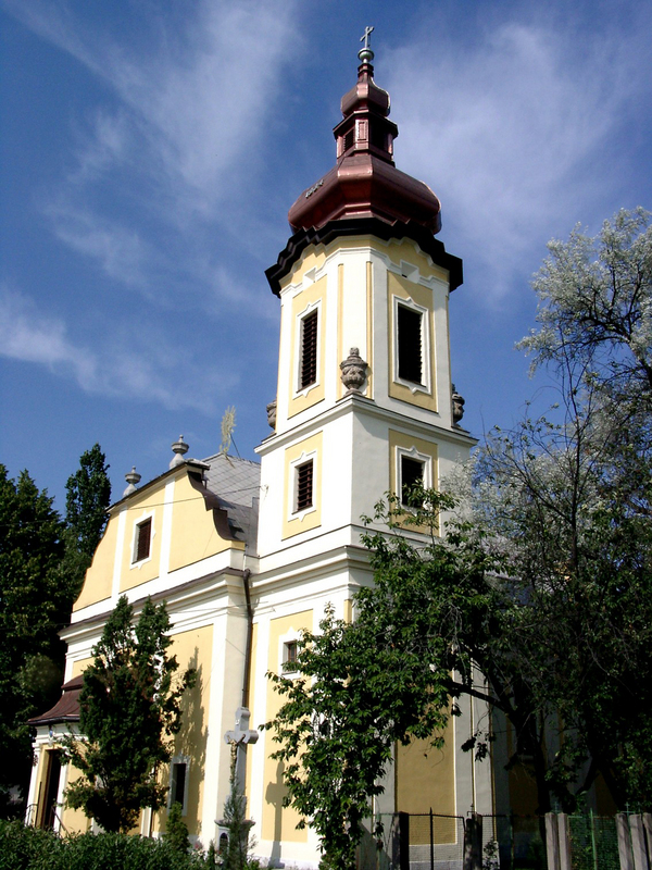 1934 épült a martintelepi hívek számára. Hejőcsabai Jézus Szíve római katolikus templom